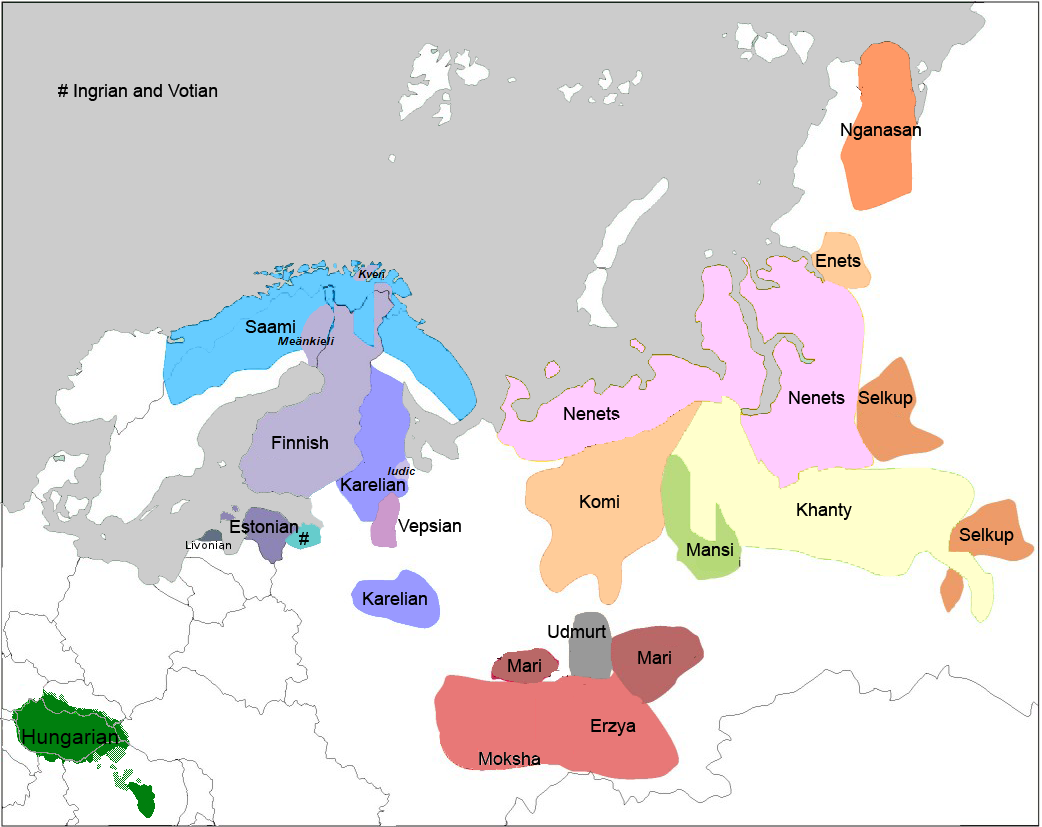 finno ugric languages updated